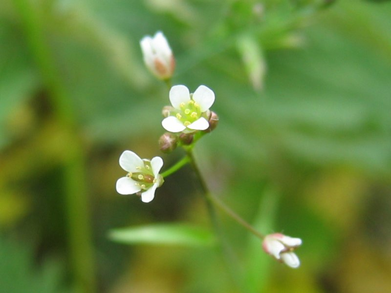 Hirtentäschelkraut Capsella bursa-pastoris